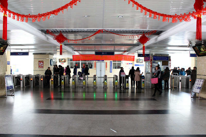 武汉地铁2号线